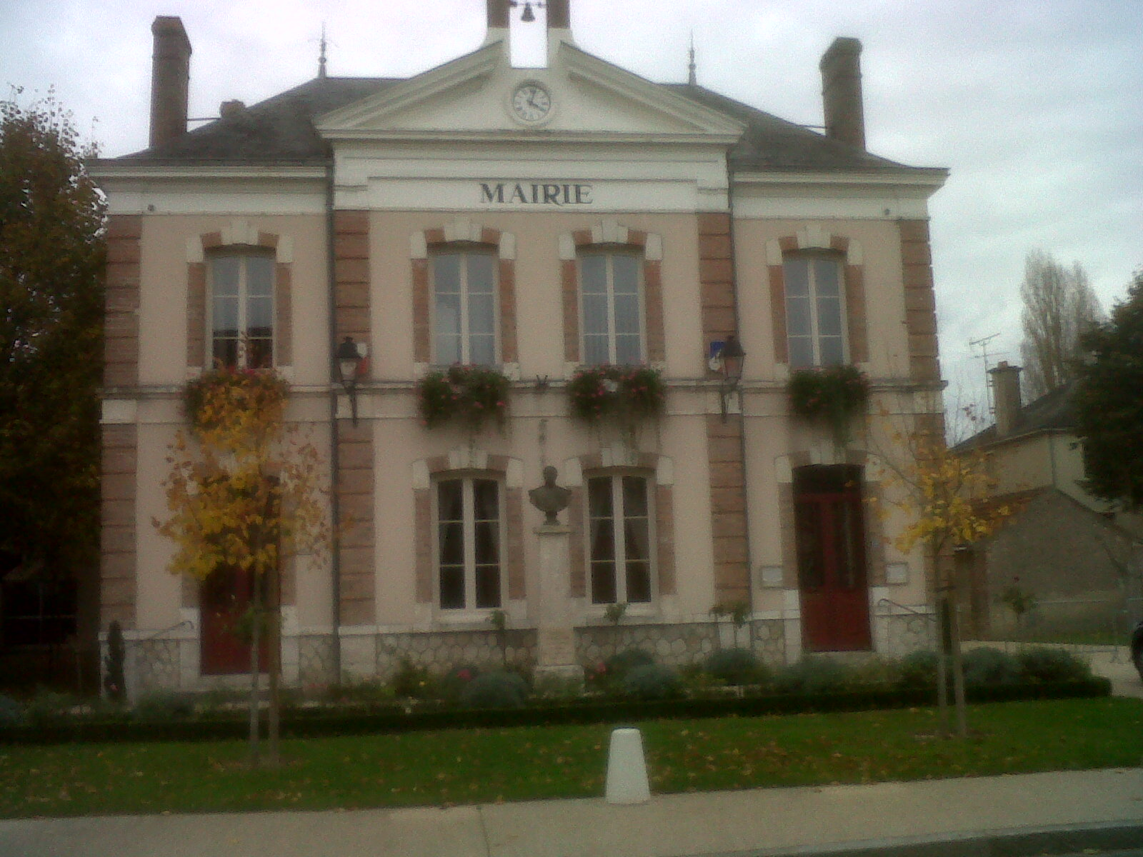 Mairie de Montcresson